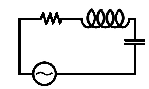 교류회로도